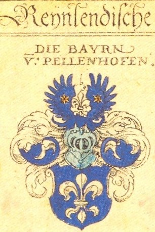 Wappen der rheinischen Familie Bayer von Bellenhofen